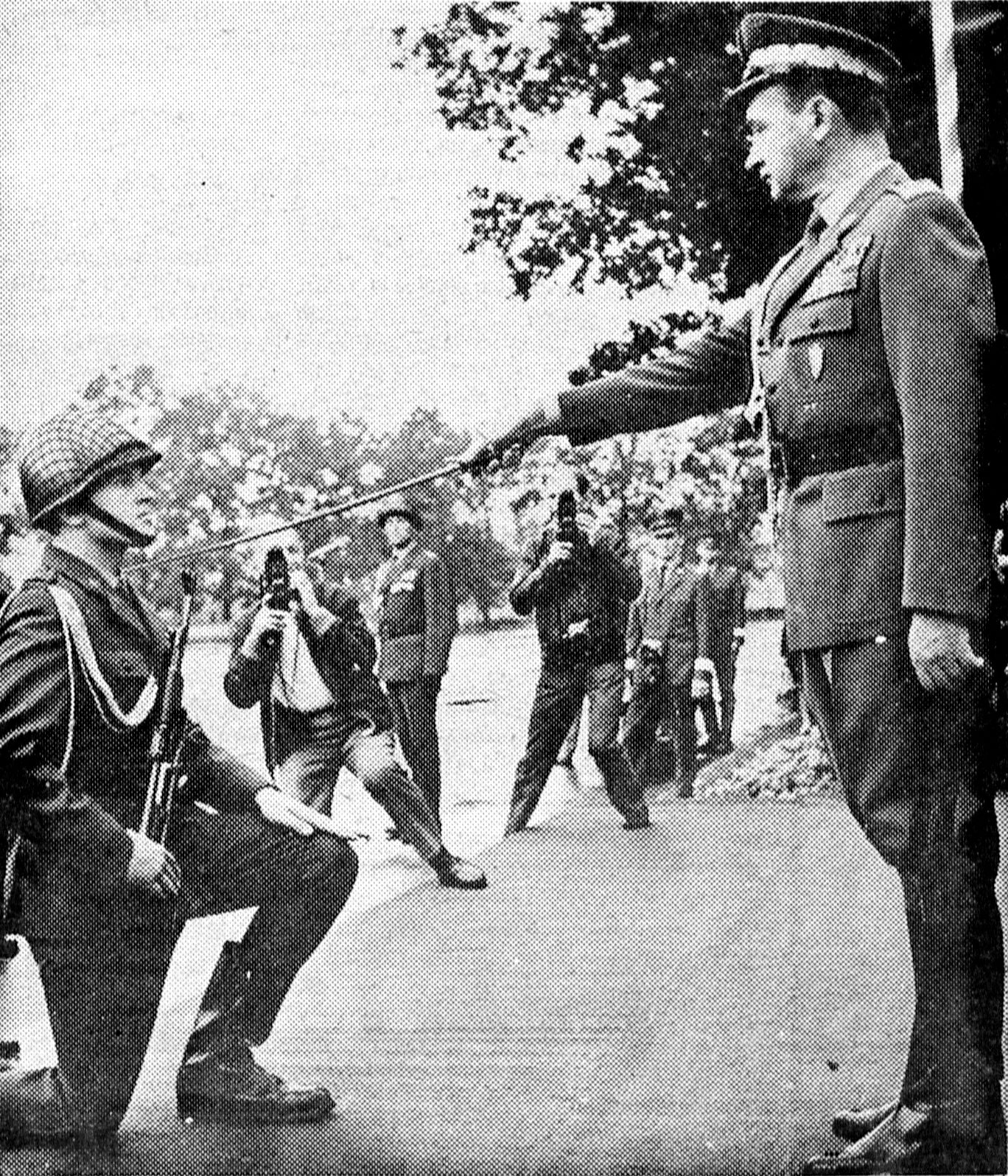 Wojciech Jaruzelski